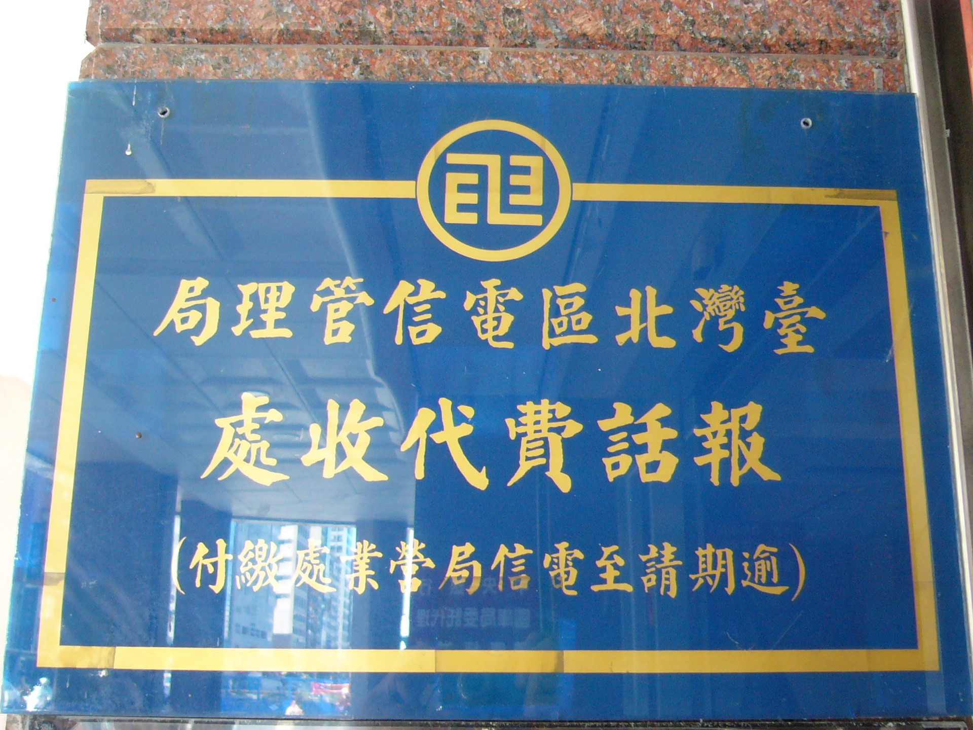 台灣北區電信管理局電報/電話費代收處標示牌，圓形圖案為中華民國交通部電信總局局徽